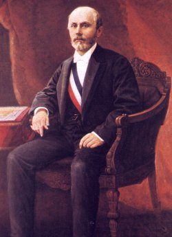 Retrato de Aníbal Pinto Garmendia, Presidente de Chile (1876-1881)